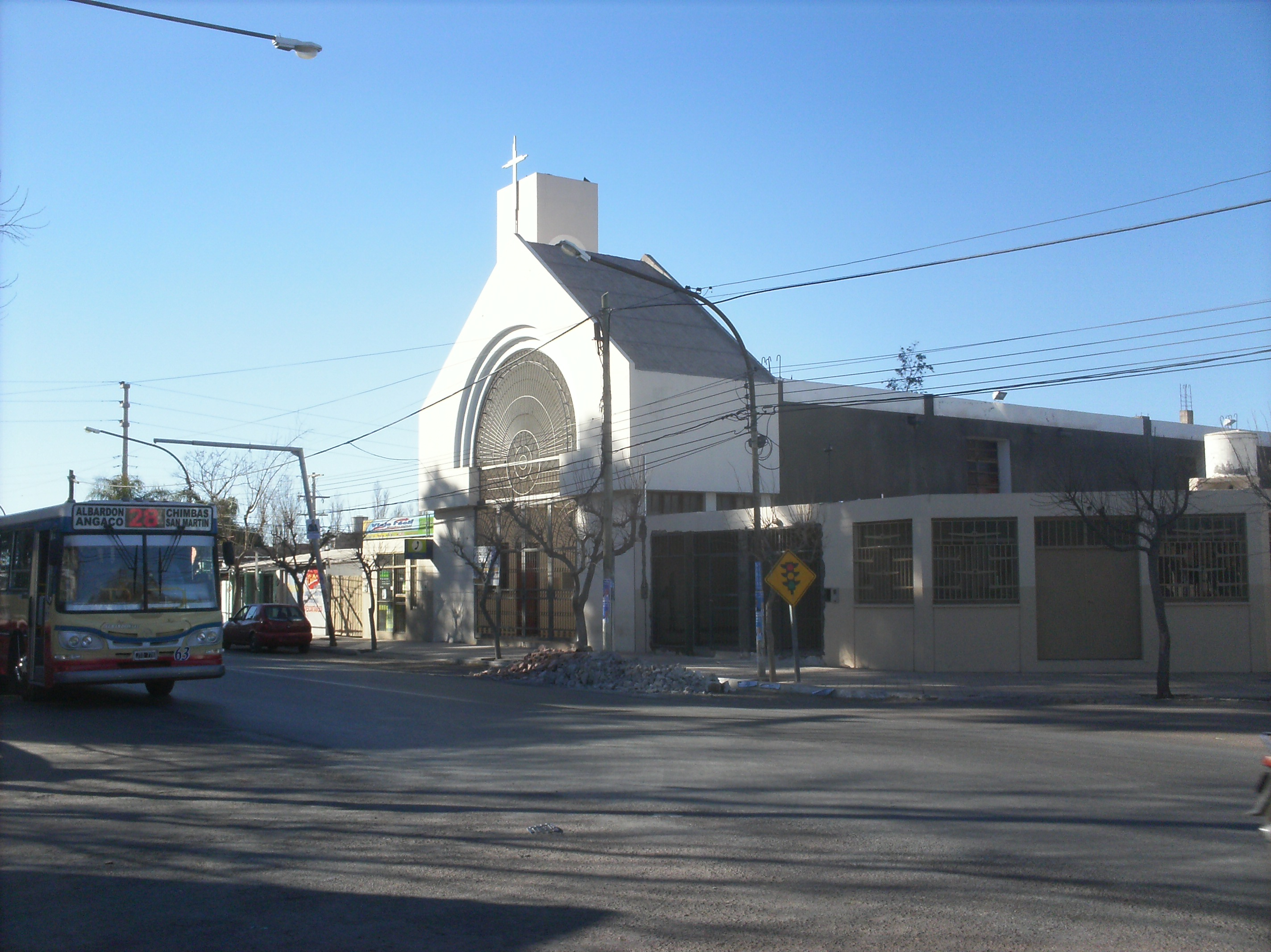 Iglesia Católica de Villa Paula Albarracín de Sarmiento, localidad cabecera del departamento Chimbas, provincia de San Juan, Argentina.